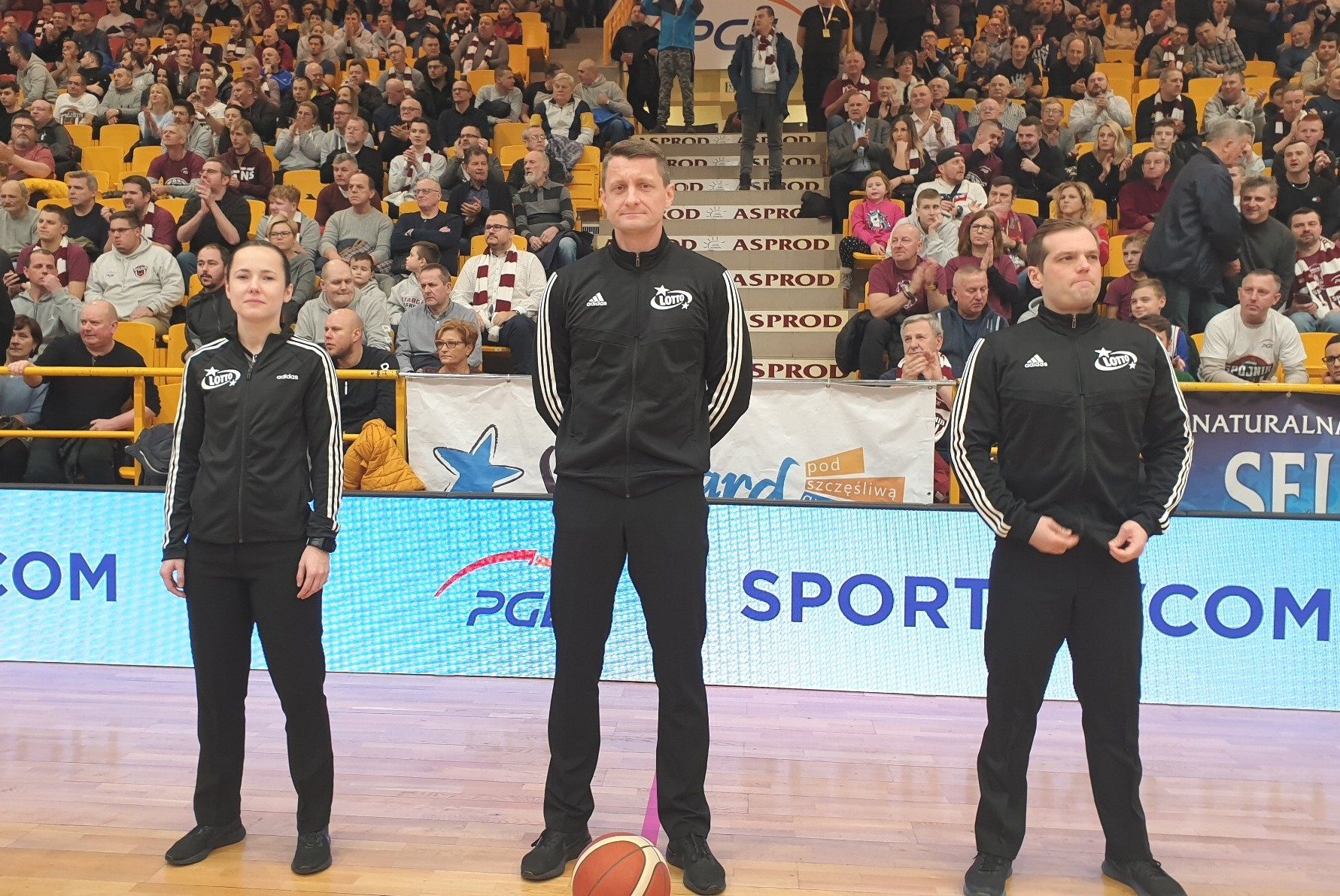 Stargard. Sędziowie meczu Spójnia - Polpharma